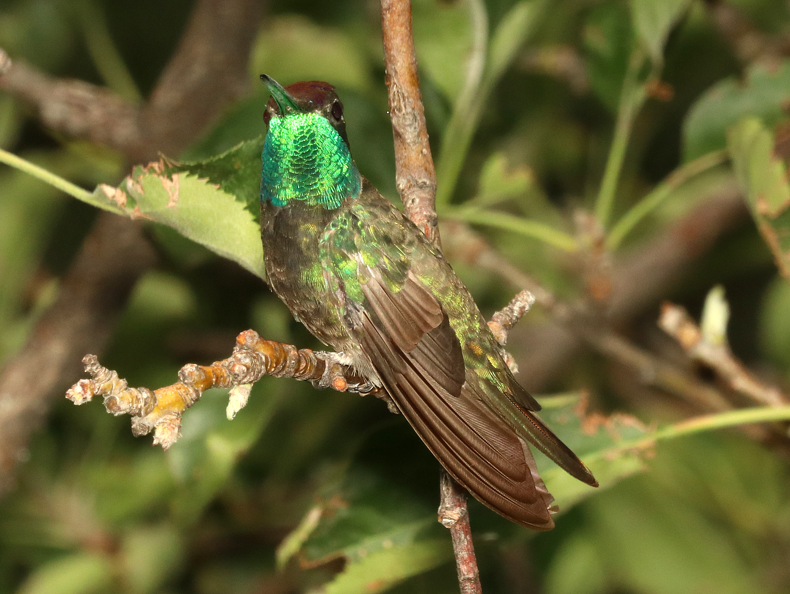 495 - RIVOLI'S HUMMINGBIRD (8-17-2018) madera canyon, santa cruz co, az -04